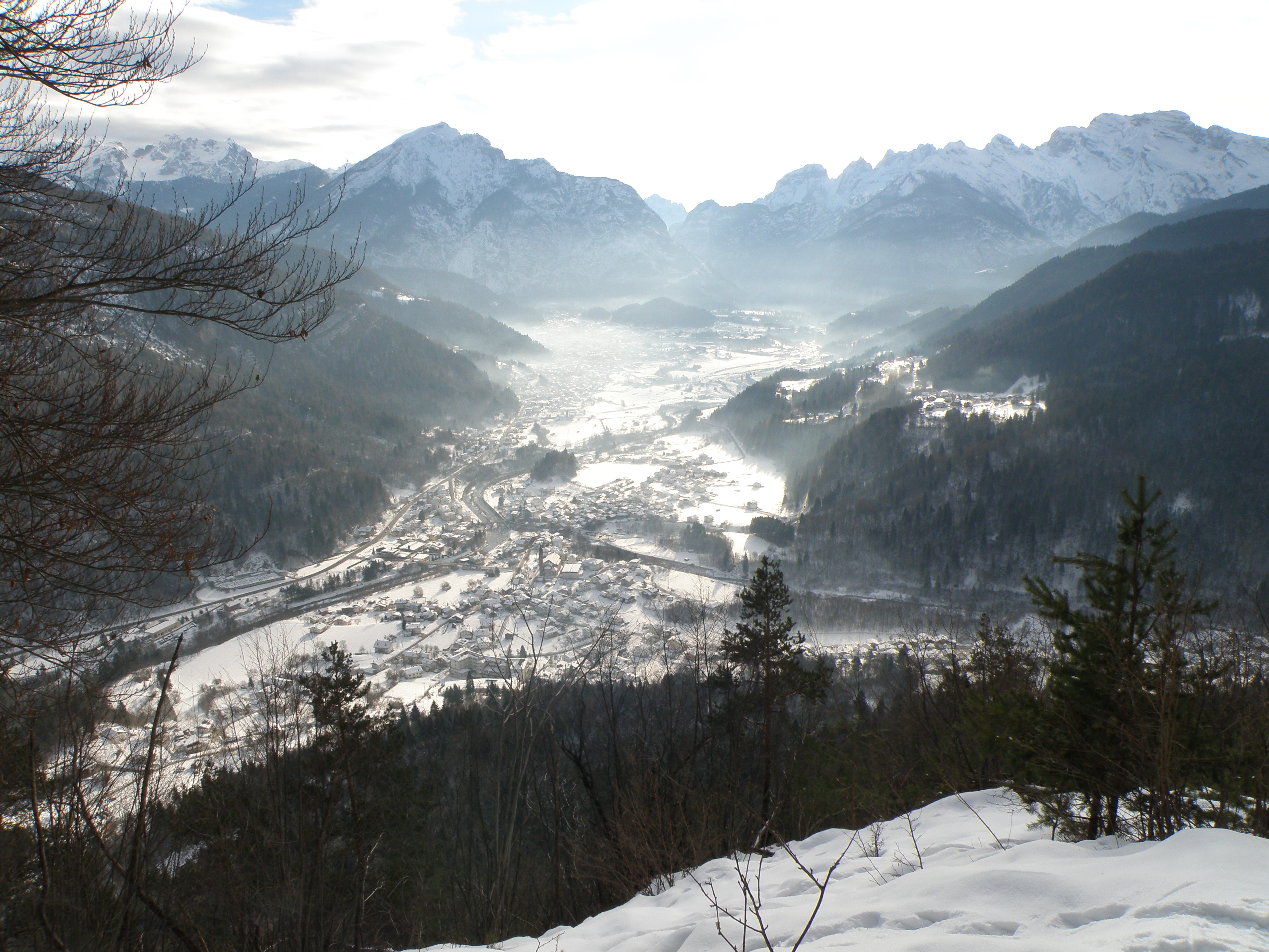 Taibon_Agordino_e_Agordo_sullo_Sfondo